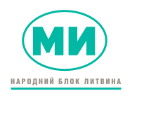 логотип блоку Литвина